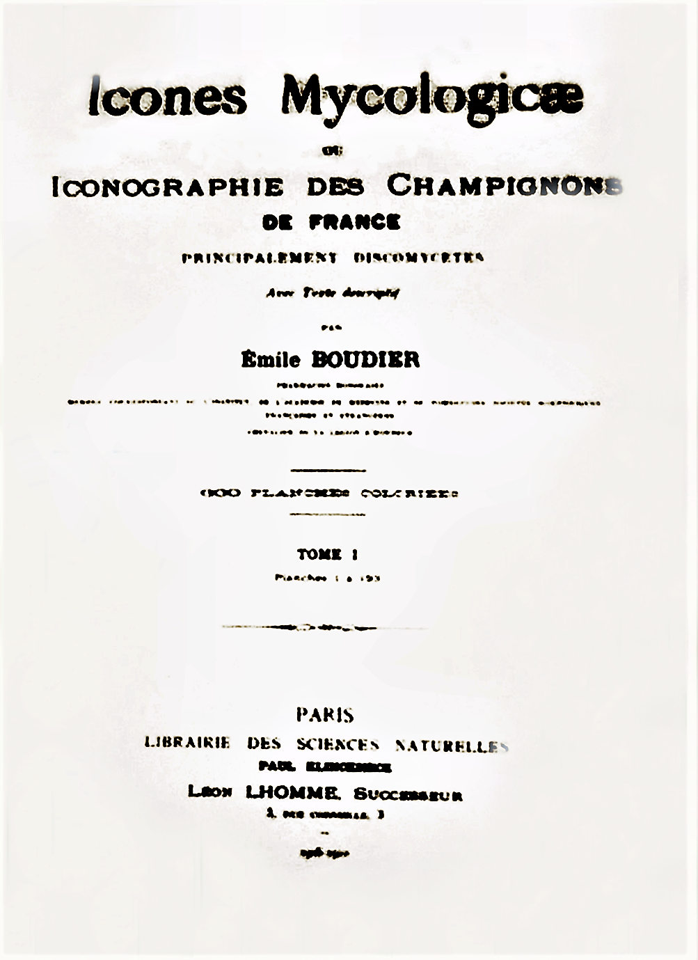 Émile Boudier: Icones Mycologicae , vol. 1, Editura Paul Klincksieck,.Paris 1905